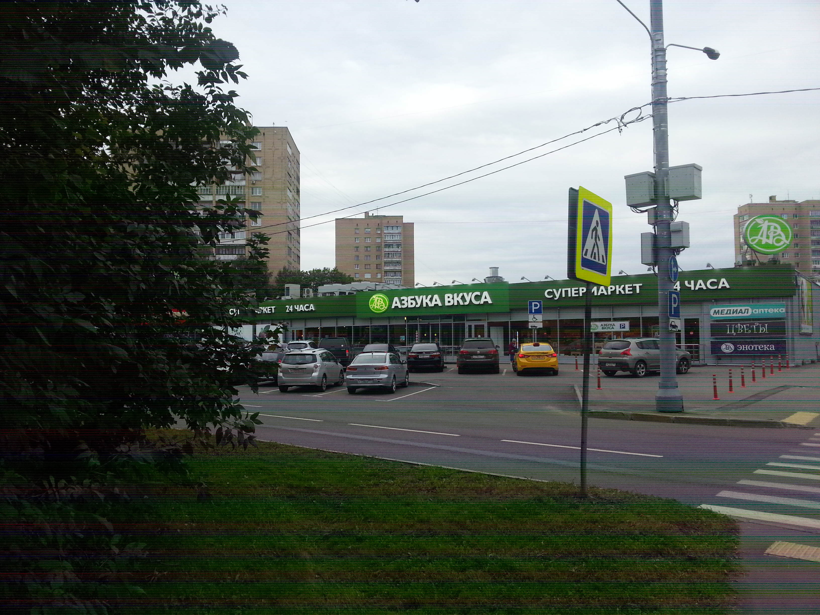 Магазин "Азбука Вкуса" в г. Зеленоград. 26 августа 2016г.